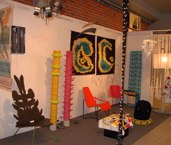 Textilt konsthantverk & Design 2005. Inredningsdesign